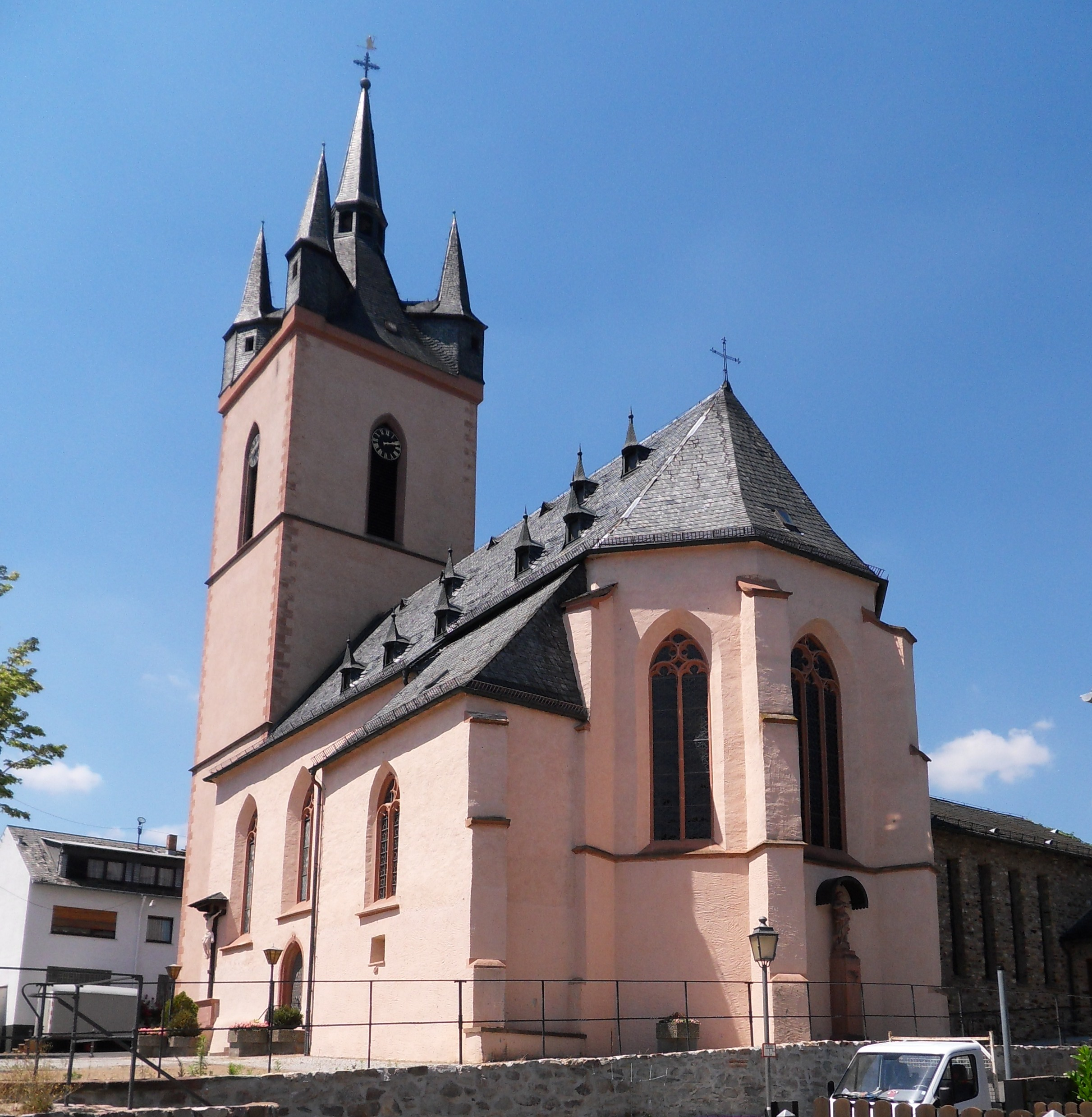 Katholische Pfarrkirche St. Antonius in Rauenthal, Blick von Südosten